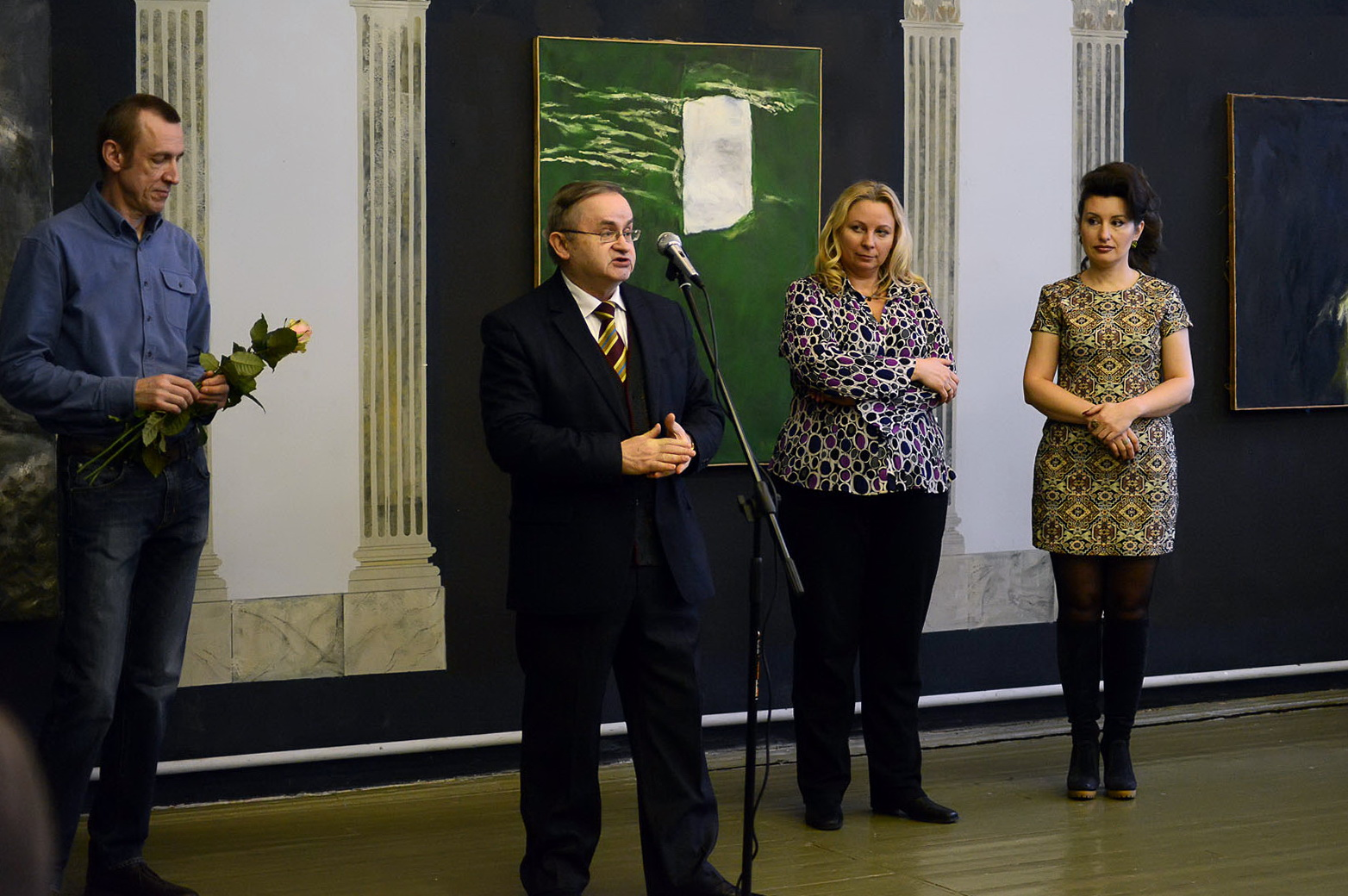 Открытие персональной выставки Валерия Песина "Детали", Музей современного изобразительного искусства, Минск, Республика Беларусь, март 2015 года. Выступление коллекционера Евгения Ксеневича